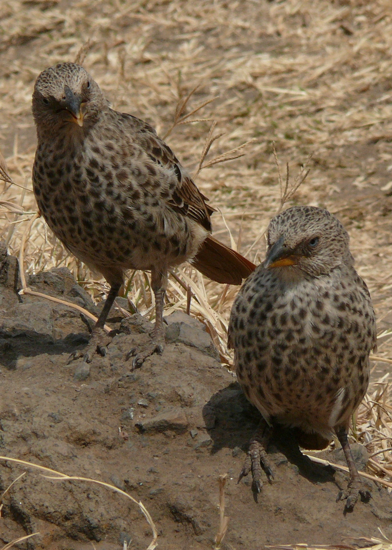 Rotschwanzweber Histurgops ruficaudus Reichenow, 1887